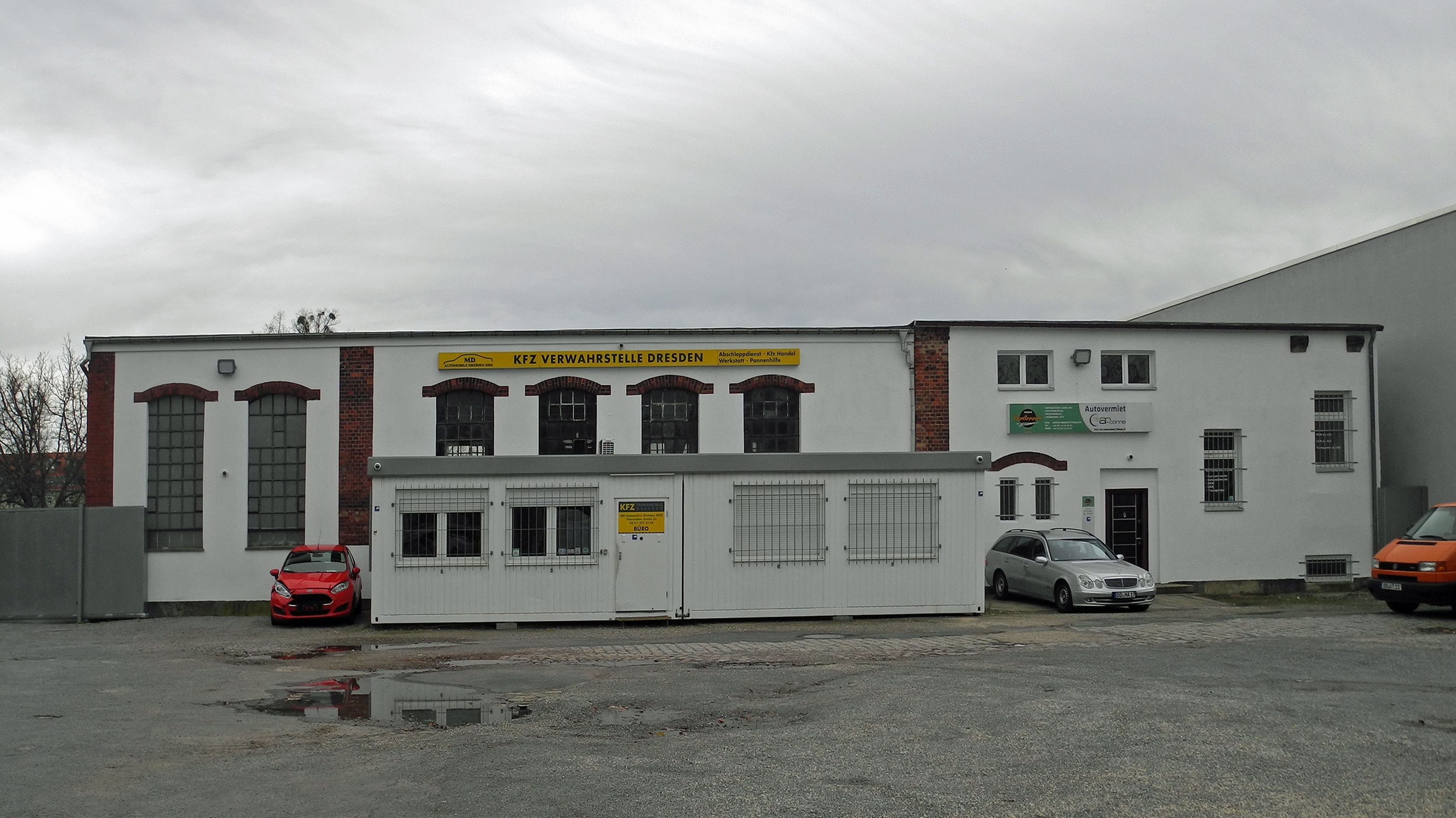 Teil eines alten Gebäudes im Innenbereich des ehem. Firmenareals der Schokoladenfabrik C. C. Petzold & Aulhorn in Dresden-Plauen, Tharandter Str. 63